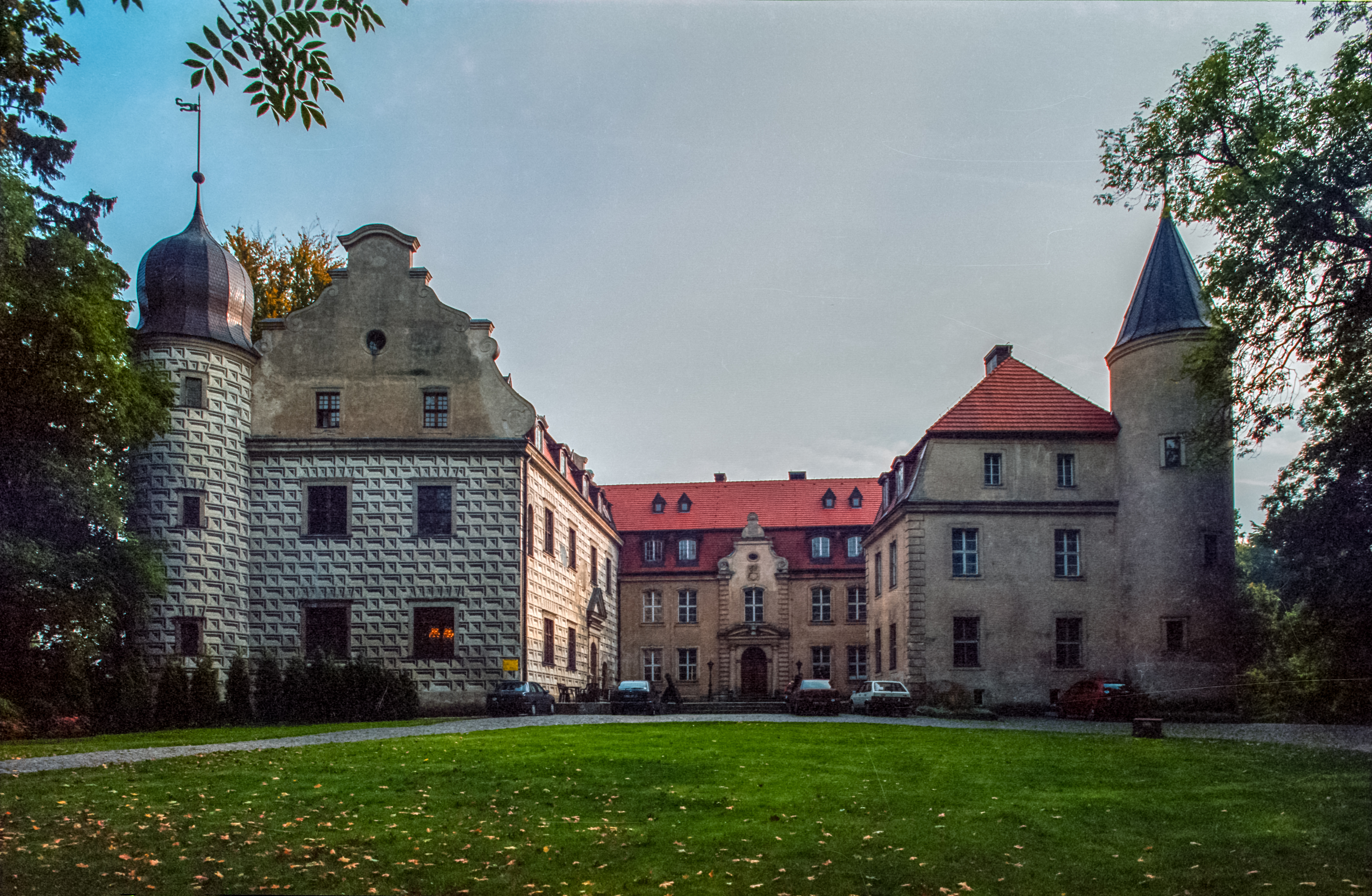 Poland, Tuczno Castle